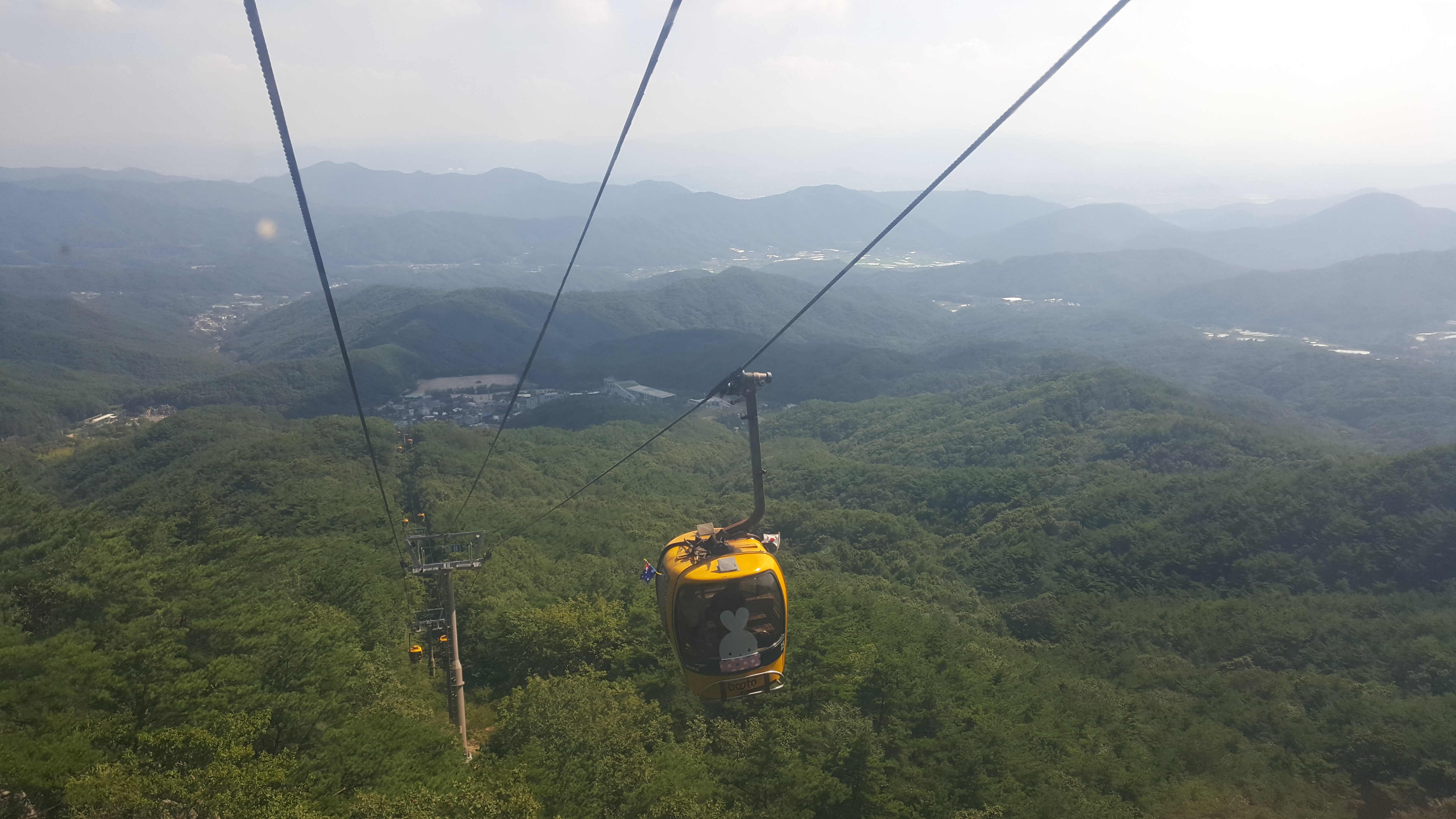 2016년 8월 팔공산 케이블카